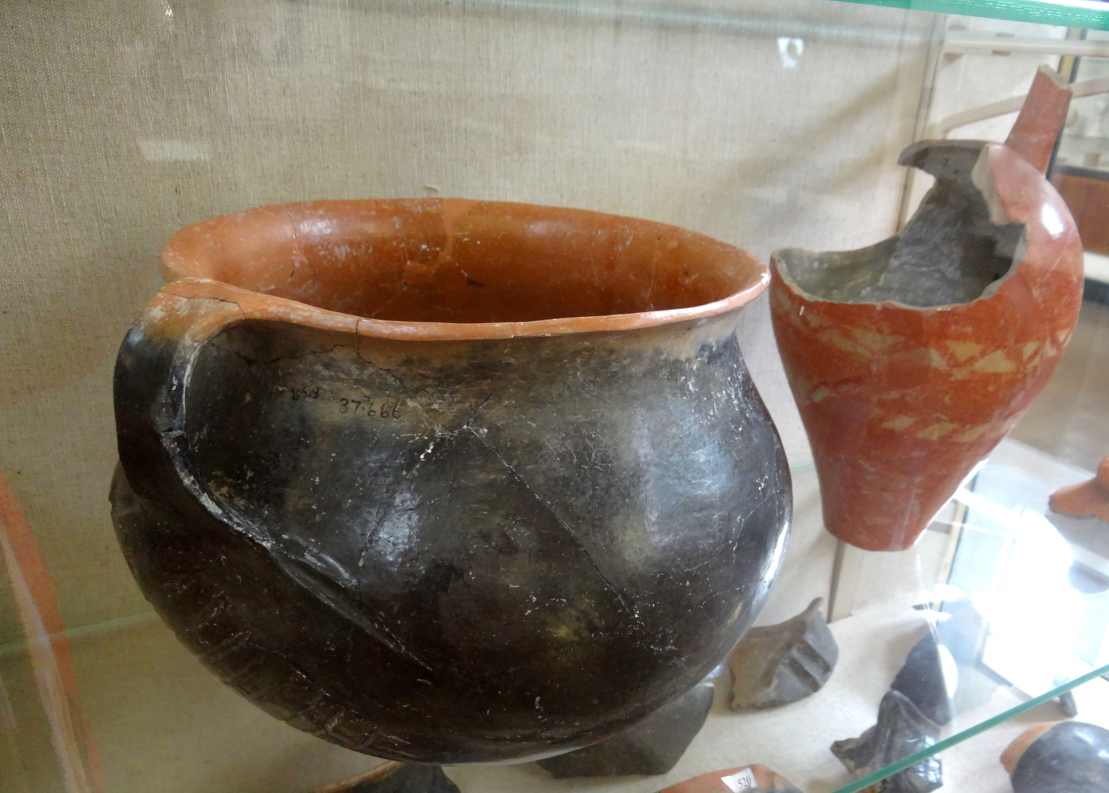 Beth Yerah Pottery from Early Bronze Age כלי בית ירח, משפחת כלים מתקופת הברונזה הקדומה הנקראת על שם תל בית ירח ליד הכנרת